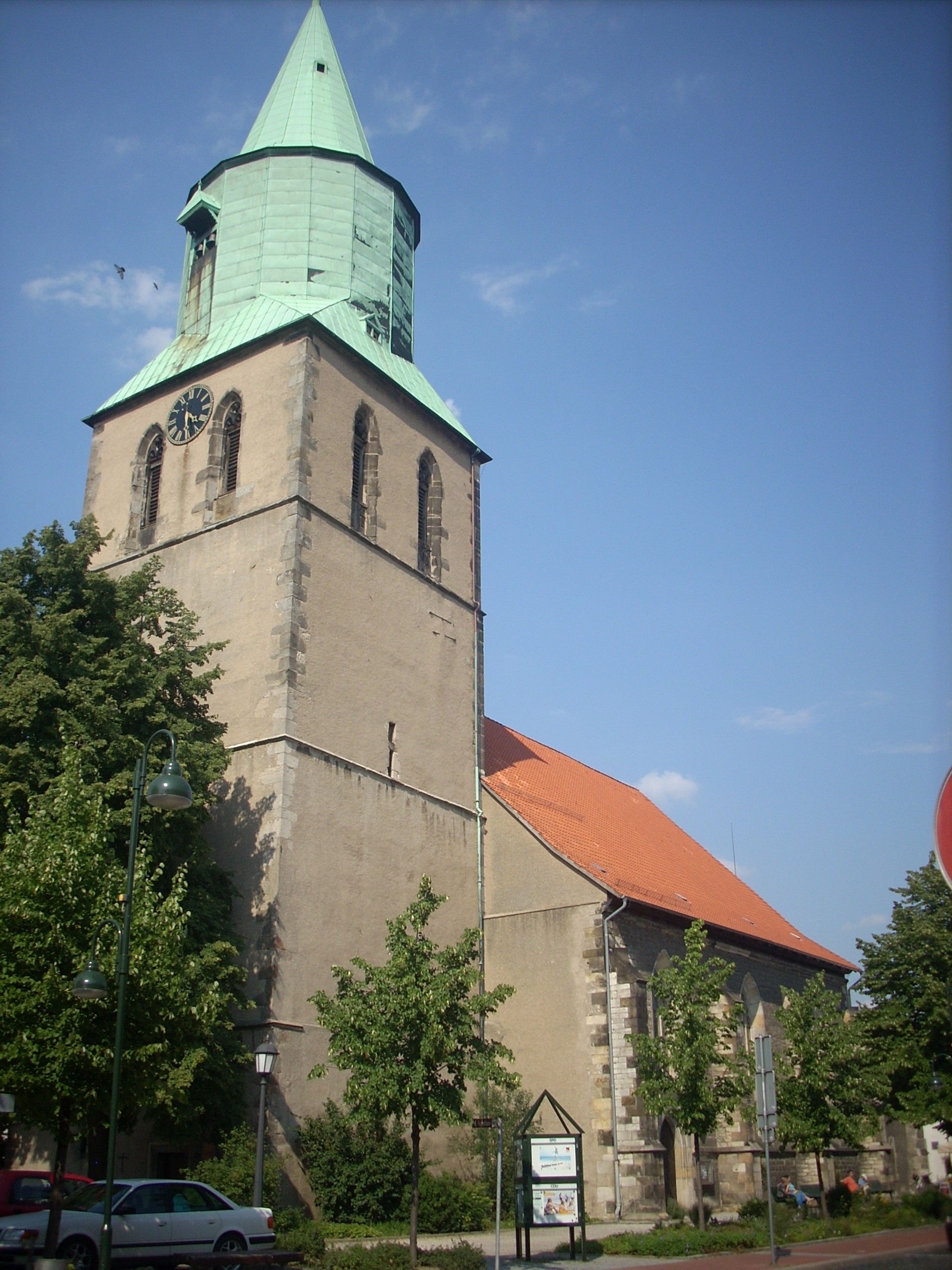 Gronau (Leine), Ev.-luth. Kirche St. Matthäus